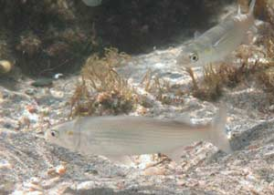 Picture of Liza aurata